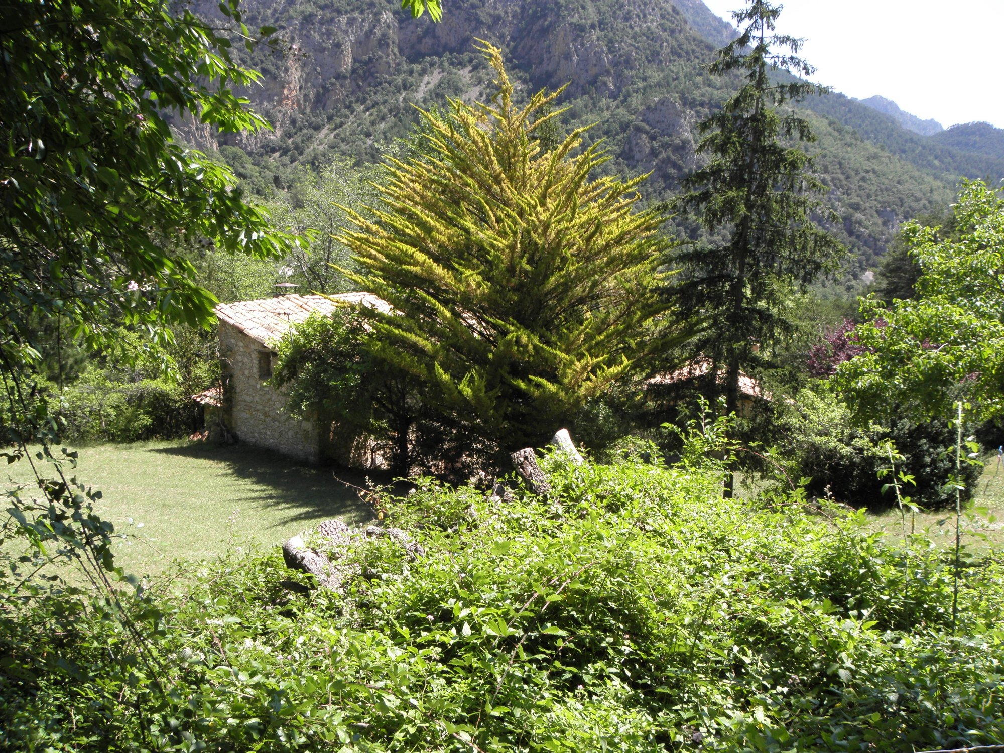 La masia de Cal Serni, al poble de la Coma (municipi de la Coma i la Pedra, Vall de Lord, Solsonès)